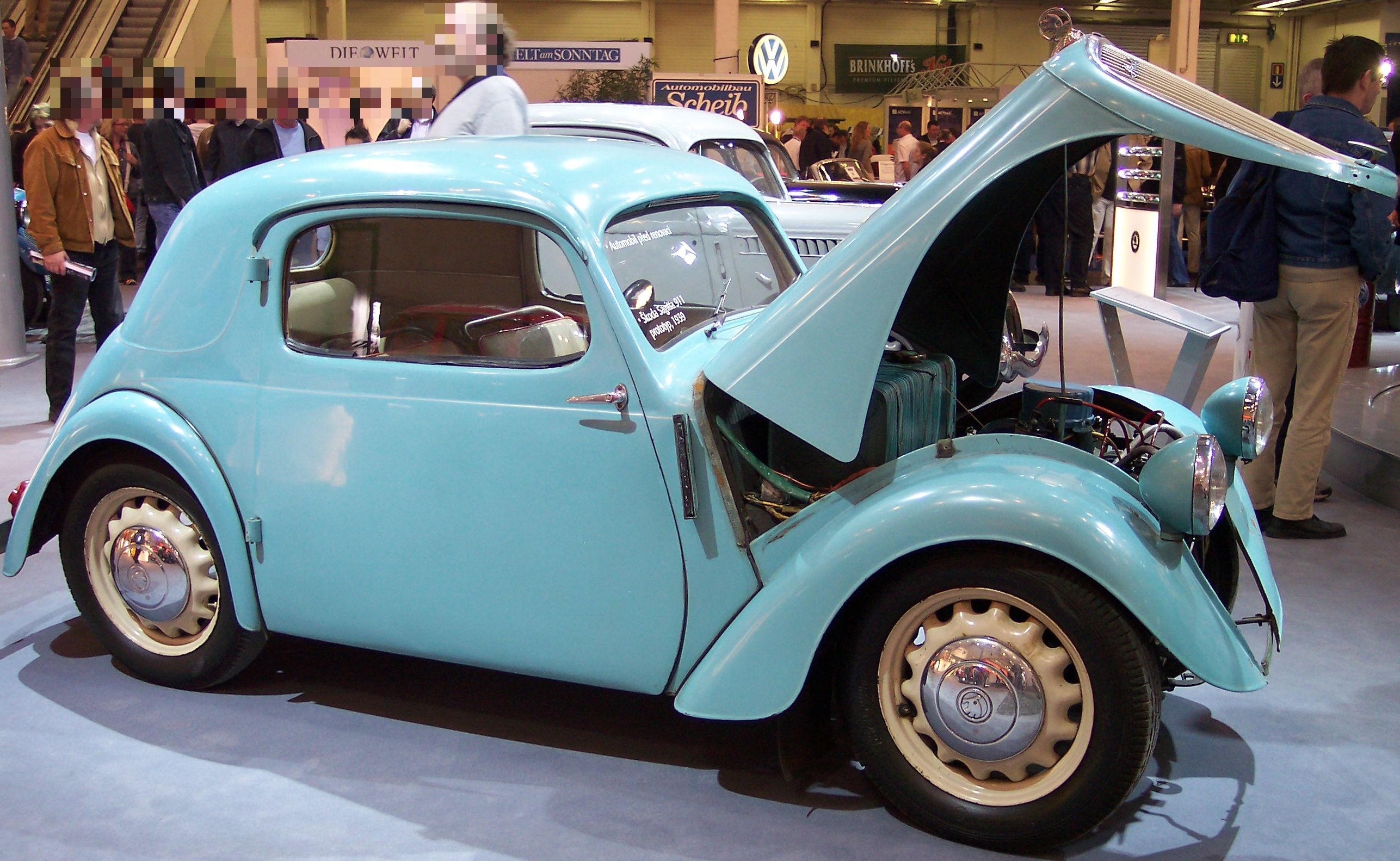 Skoda Sagitta 911 Prototype